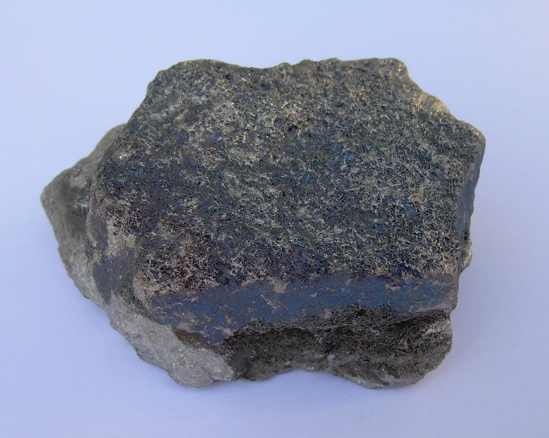 Ferrochrome